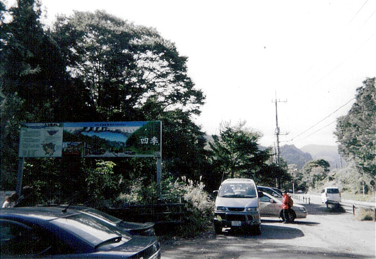 Yamba Dam